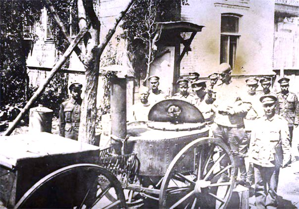 Генерал Н.Э.Бредов проверяет пищу полковой кухни пехотно-артиллерийского образца войск Киевской области, Киев